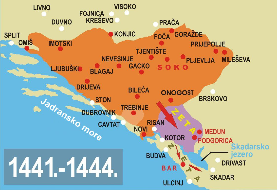 Pohod na Zetu 1441.-1444.